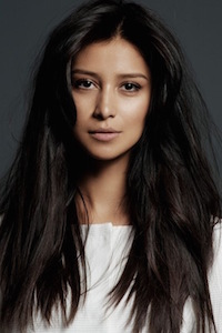 Фото Равшаны Курковой